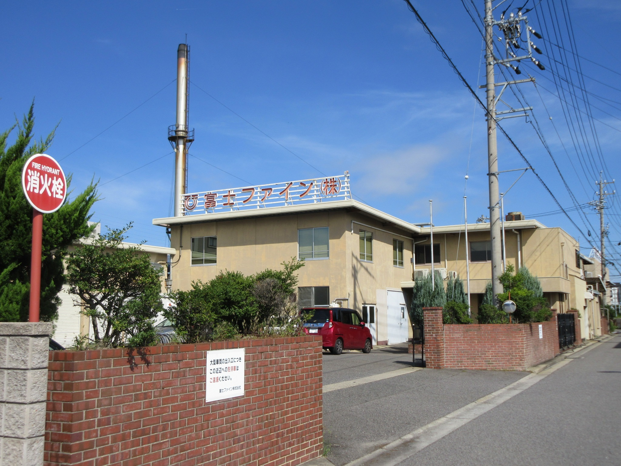 富士ファイン株式会社（岡崎市日名西町）